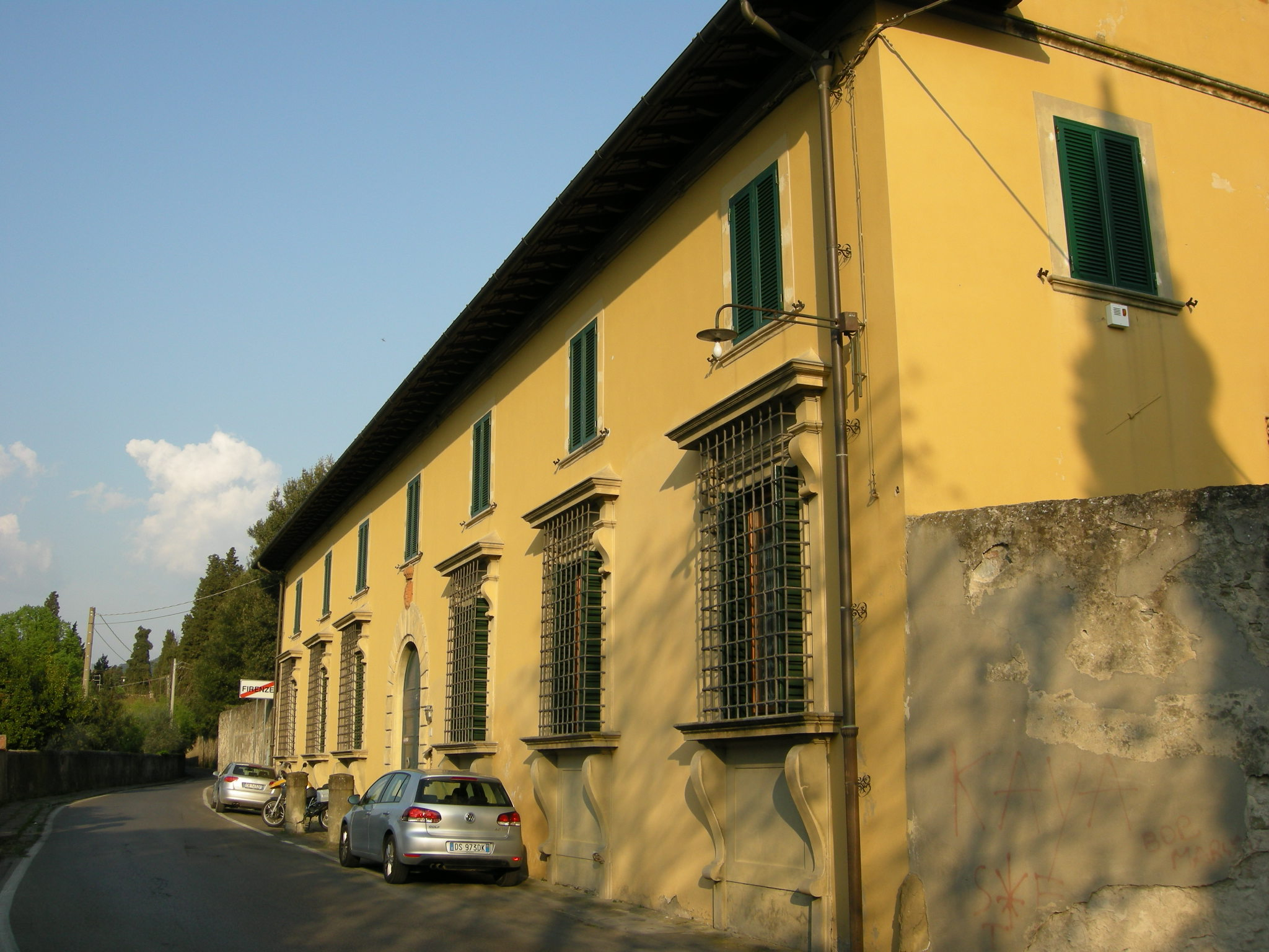 Villa ruspoli da s.marta